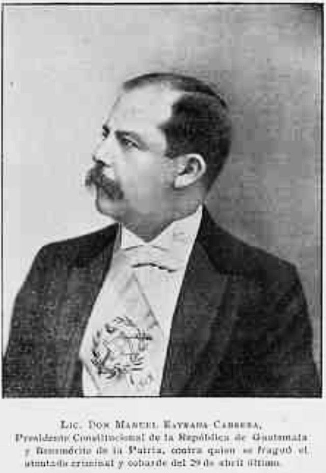 Retrato oficial del presidente Manuel Estrada Cabrera en 1907, publicado tras el Atentado de La Bomba en su contra el 29 de abril de 1907.